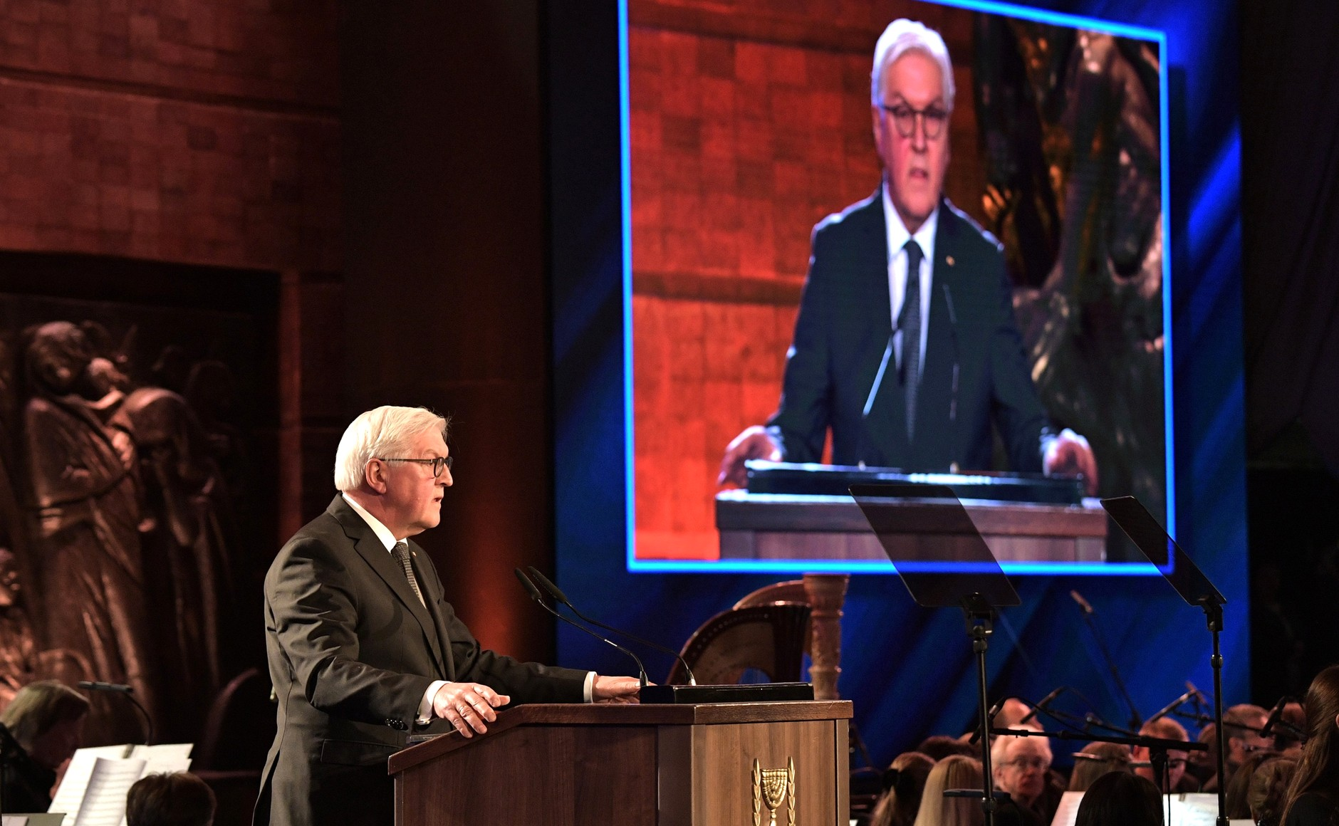 Федеральный президент Федеративной Республики Германия Франк-Вальтер Штайнмайер на форуме «Сохраняем память о Холокосте, боремся с антисемитизмом».